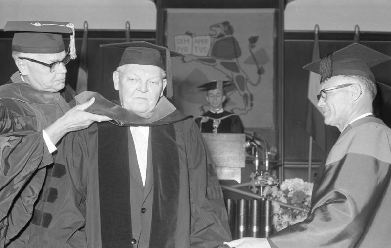 Ehrendoktorwürde der Maryland-Universität in Heidelberg an Bundeskanzler Prof. Erhard